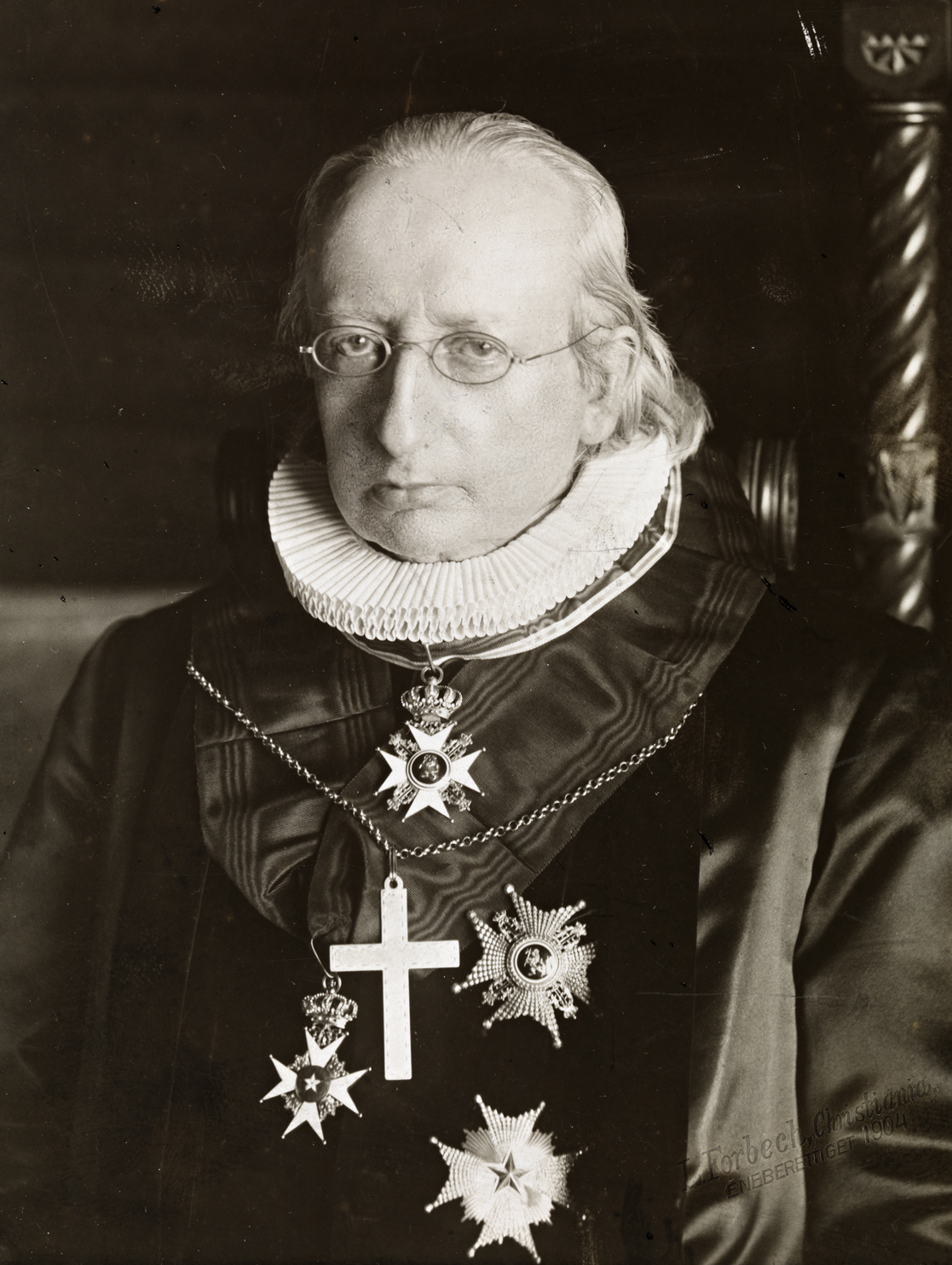 Tittel / Title: Portrett av Johan Christian Heuch (1838-1904) Motiv / Motif: Kabinettkort. Johan Christian Heuch var biskop i Kristiansand i 15 år. Han var kjent som en slagferdig og stridslysten debattant, en ualminnelig dyktig predikant og en frodig biskop. Heuch var en arg motstander av kvinnefrigjøring, målsak og avholdssak. Dato / Date: ca 1894 Fotograf / Photographer: L. Forbech (Christiania) Sted / Place: Oslo Eier / Owner Institution: Nasjonalbiblioteket / National Library of Norway Lenke / Link: Bildesignatur / Image Number: blds_03694